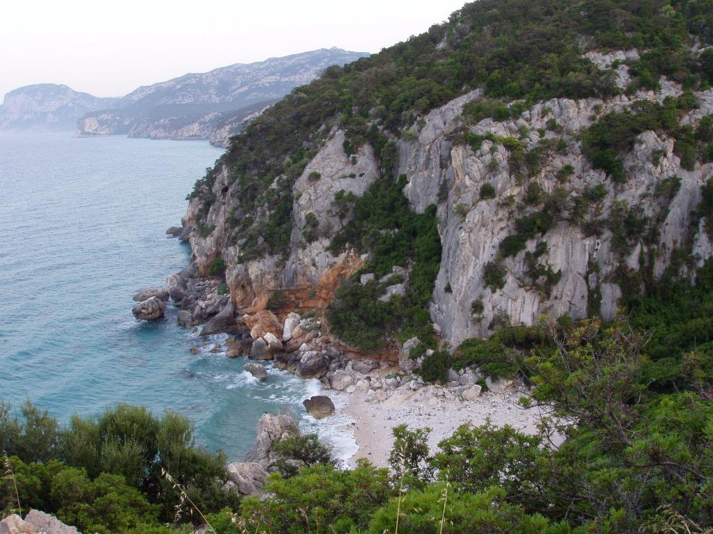 Spiaggia di Cala Fuili (Cala Gonone - NU), ripresa nel luglio 2004 da Francesco Mulas. Licenza GFDL.